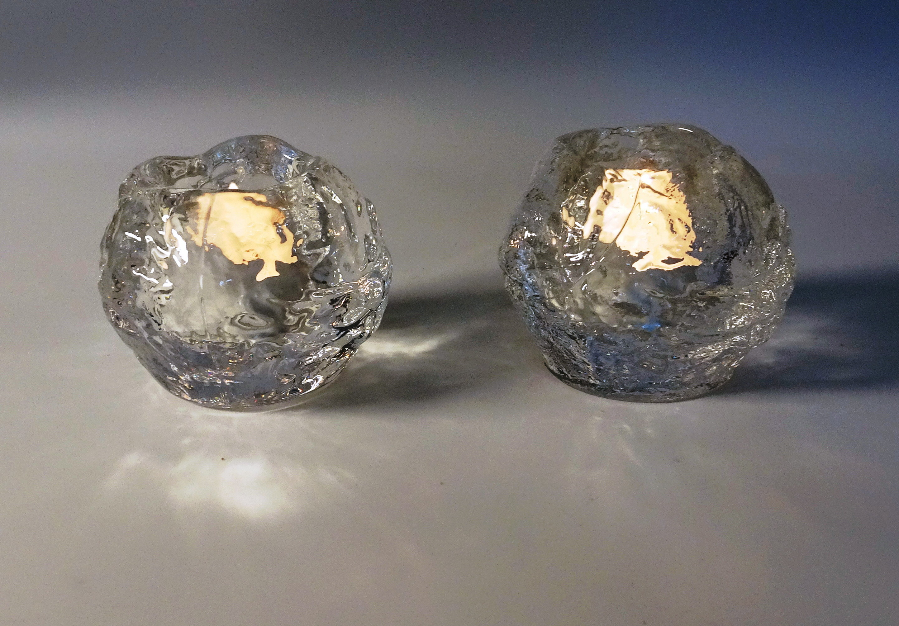 Kosta-Bodas lykta "Snöboll", design Ann Wärff (Ann Wolff)